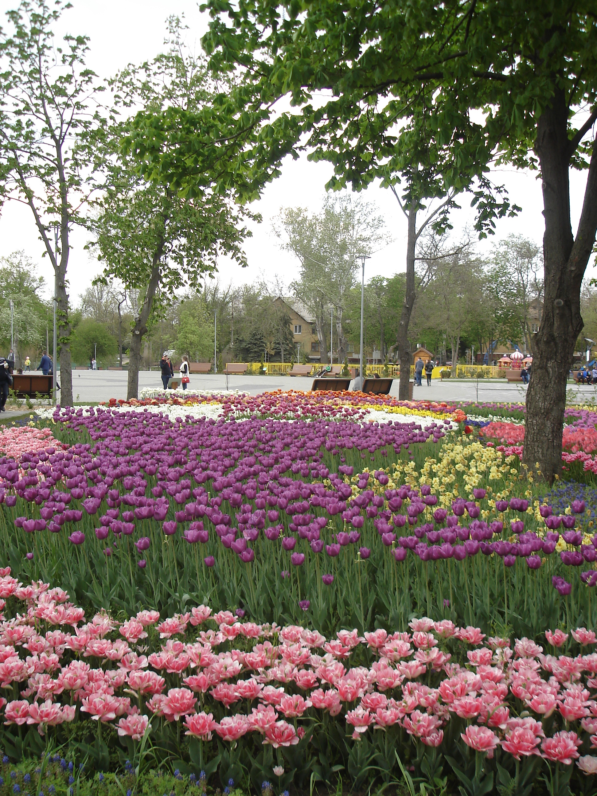 парк Веселка 2019 год